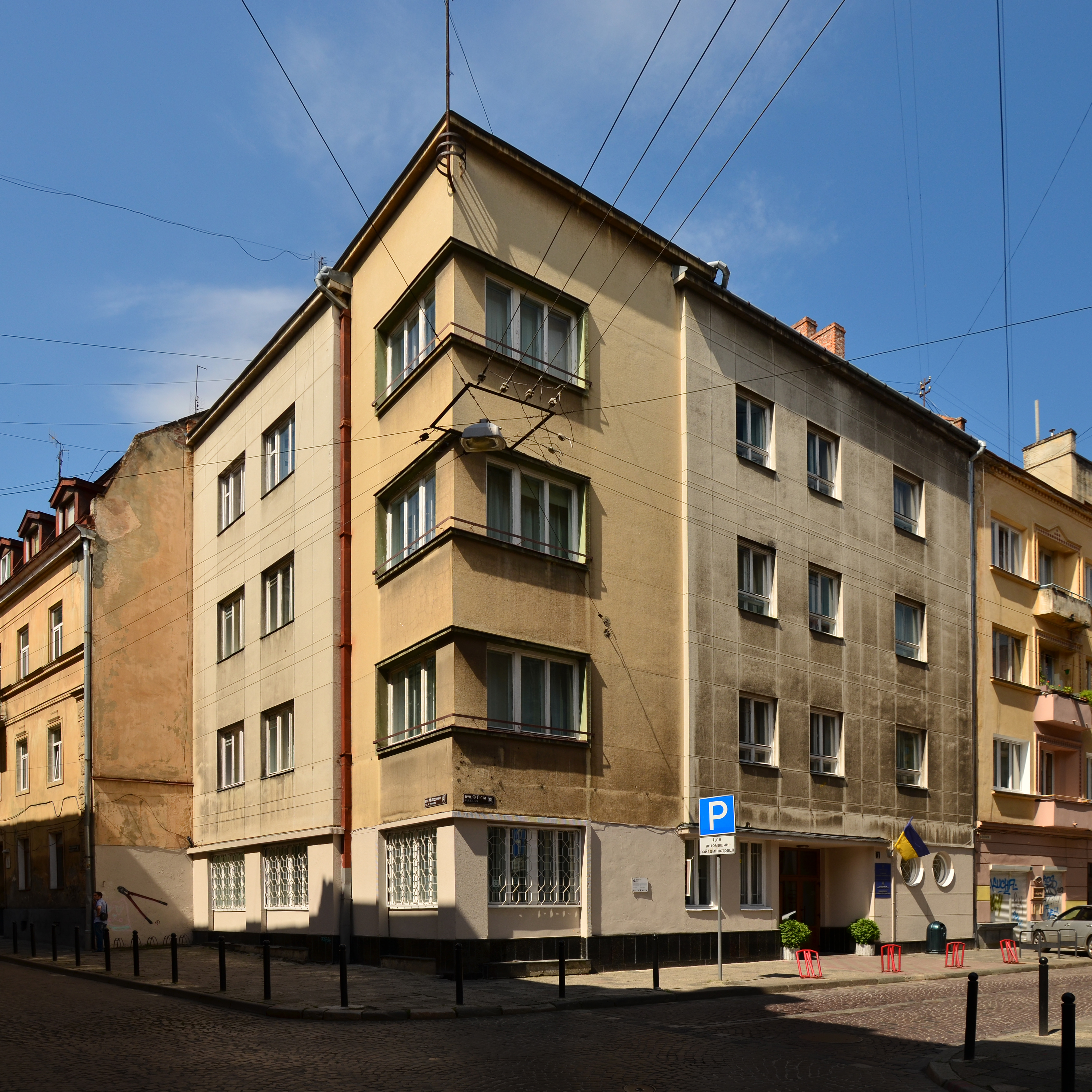 Дім на вулиці Ліста, 1 у Львові. Архітектор Веслав Ґжимальський (1891—1941).